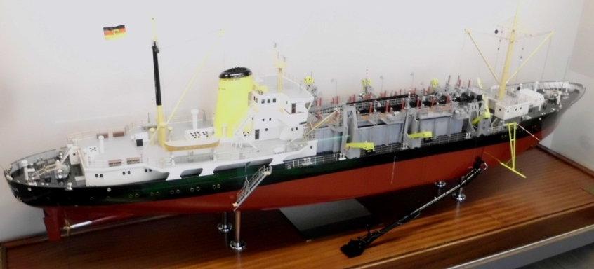 Schwimmbagger-Modell im Museum in Elsfleth